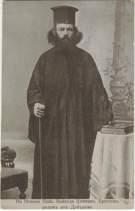 Деецът на ВМОРО Цветко Христов, предрешен като поп.